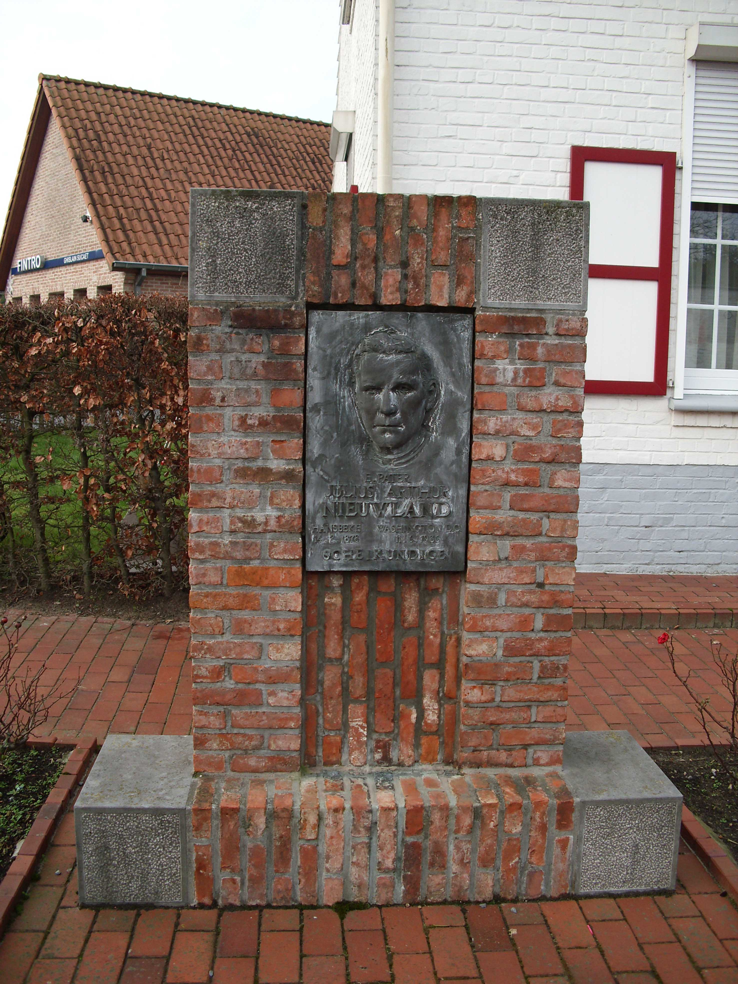 Monument Nieuwland in Hansbeke - Nevele- Oost-Vlaanderen - Vlaanderen - Belgium